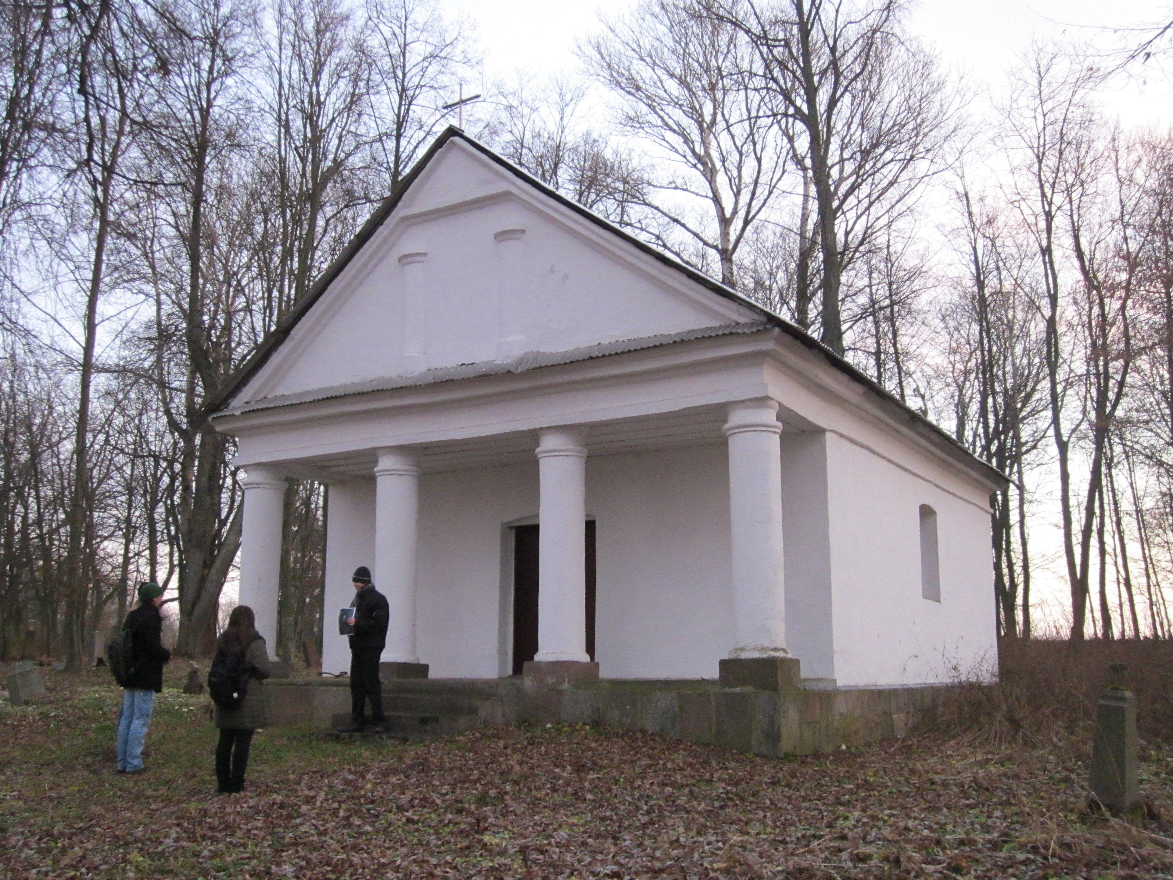 Беларуская (тарашкевіца): Комплекс былой сядзібы: сядзібны дом, парк, касьцёл, капліца-пахавальня. в. Уселюб This is a photo of Belarusian heritage monument. Reference number: 412Г000464 ( WLM)